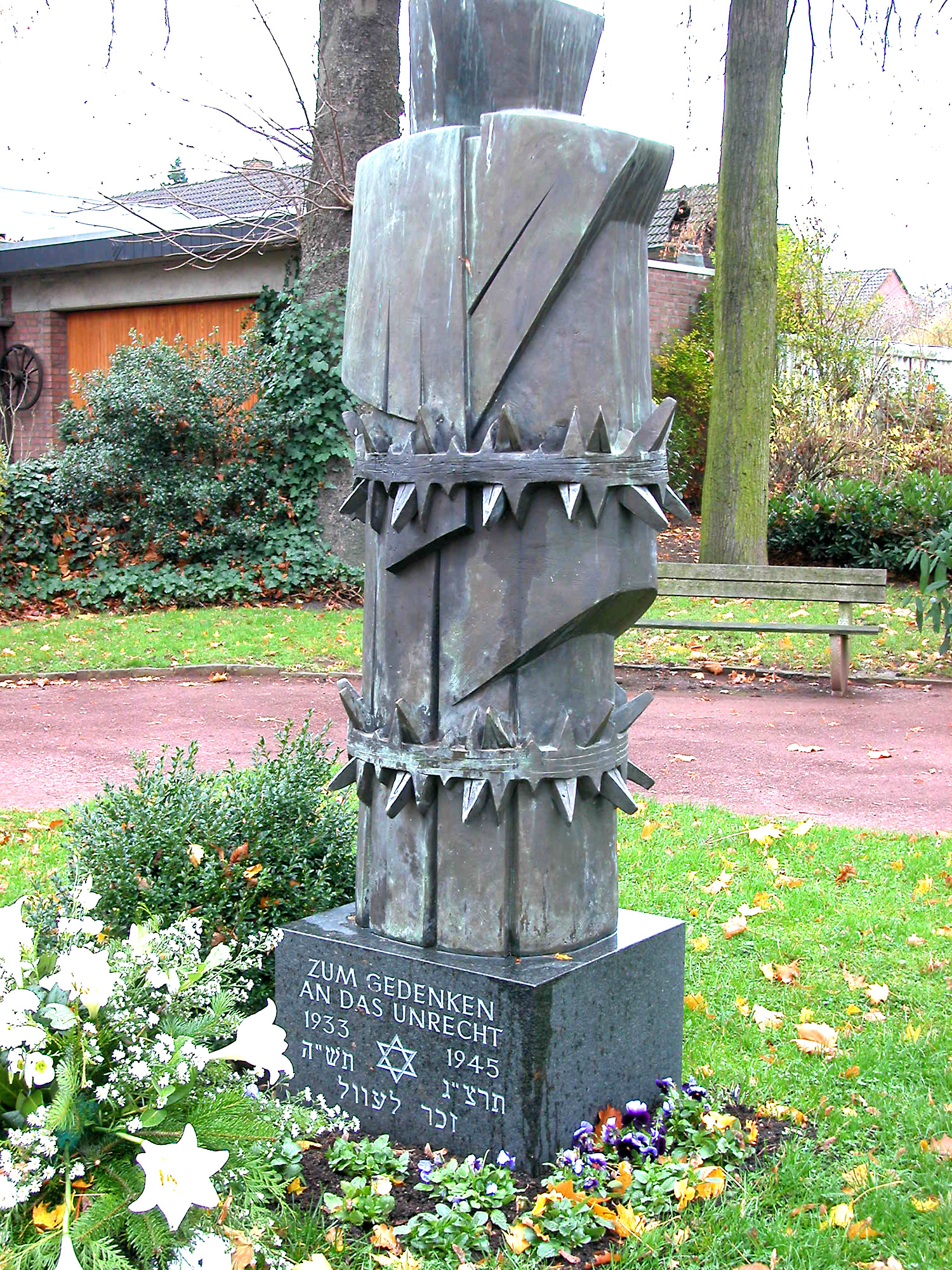 Jüdisches Denkmal in Monheim am Rhein, NRW, Deutschland (Germany)